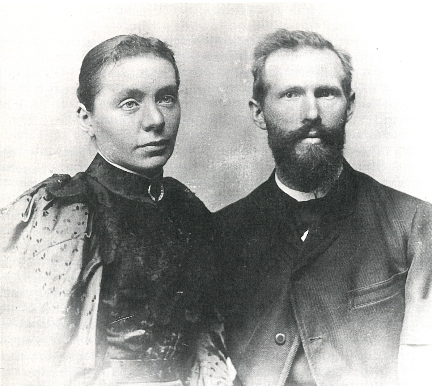 Franz Wilhelm Driesler (1854-1910), deutscher Vergolder und Kunstmaler